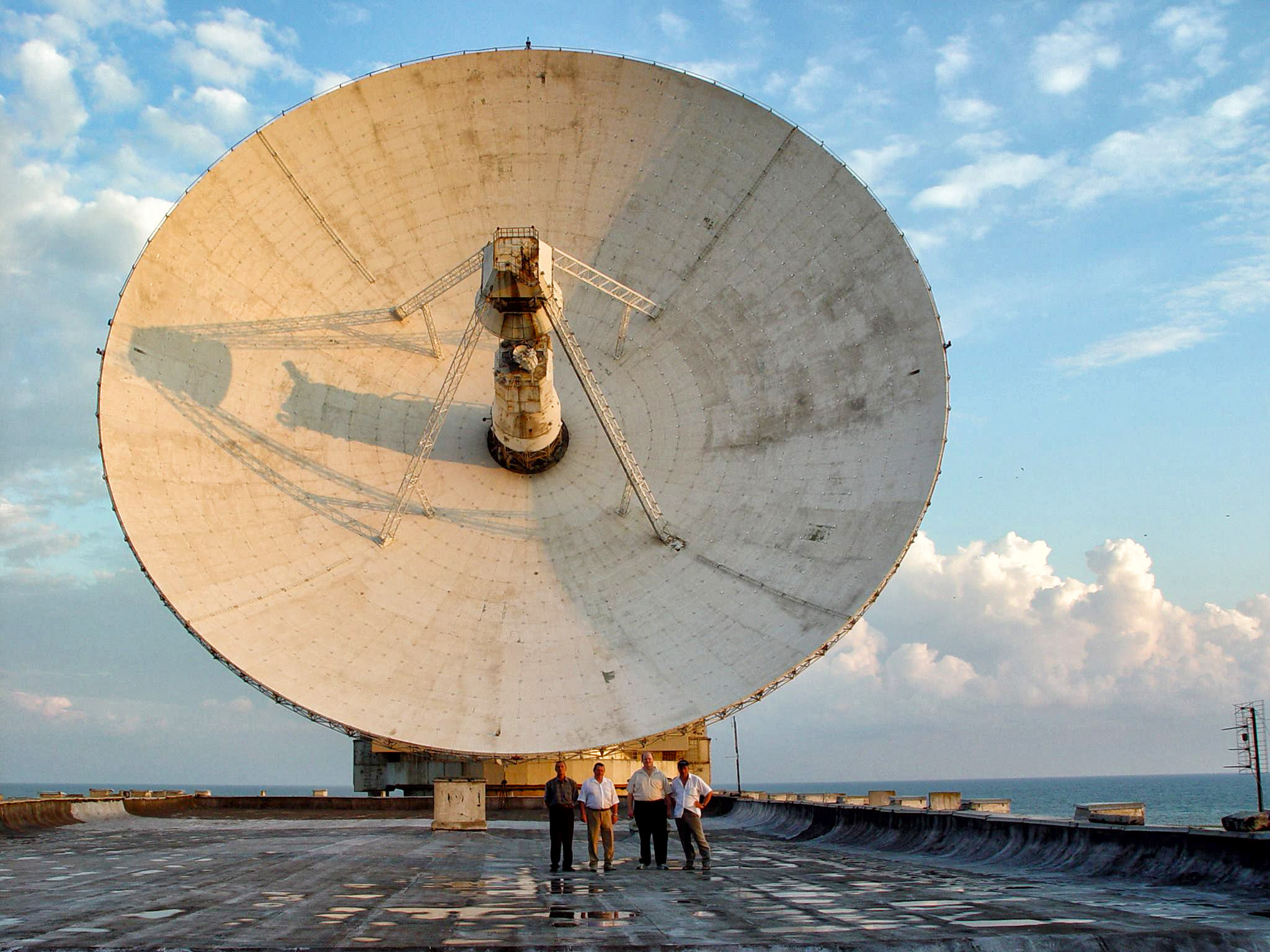 Участники проекта «Cosmic Call 2003» на фоне 70-м Евпаторийской антенны и Чёрного моря. Слева направо: Геннадий Петров, начальник одного из отделов Национального Центра управления и испытания космических средств (НЦУИКС), Виктор Абросимов, заместитель руководителя НЦУИКС, Ричард Браастад (Braastad Richard, США), менеджер проекта, Александр Зайцев, научный руководитель проекта.